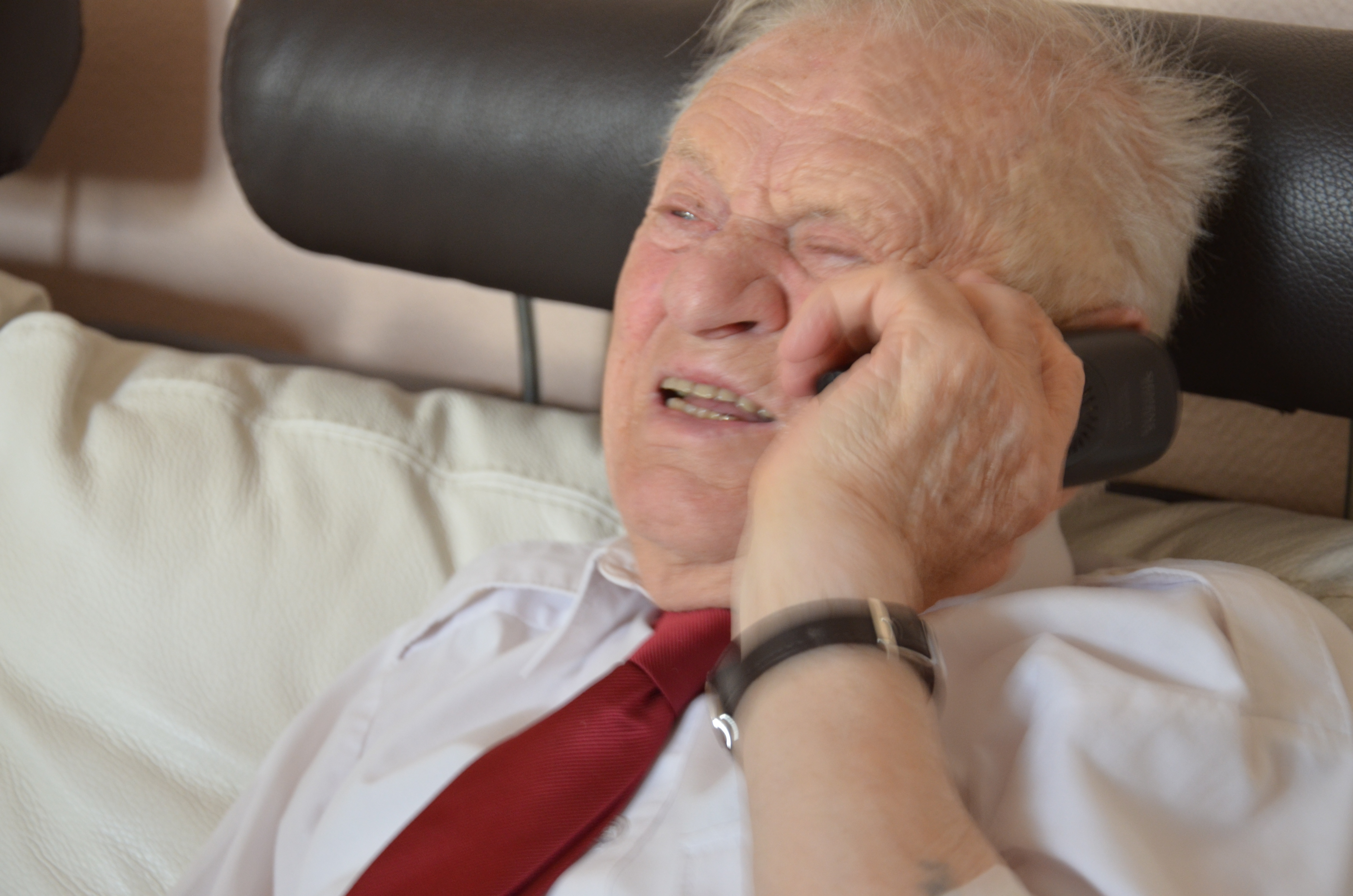 Boruch Szlezinger au téléphone.